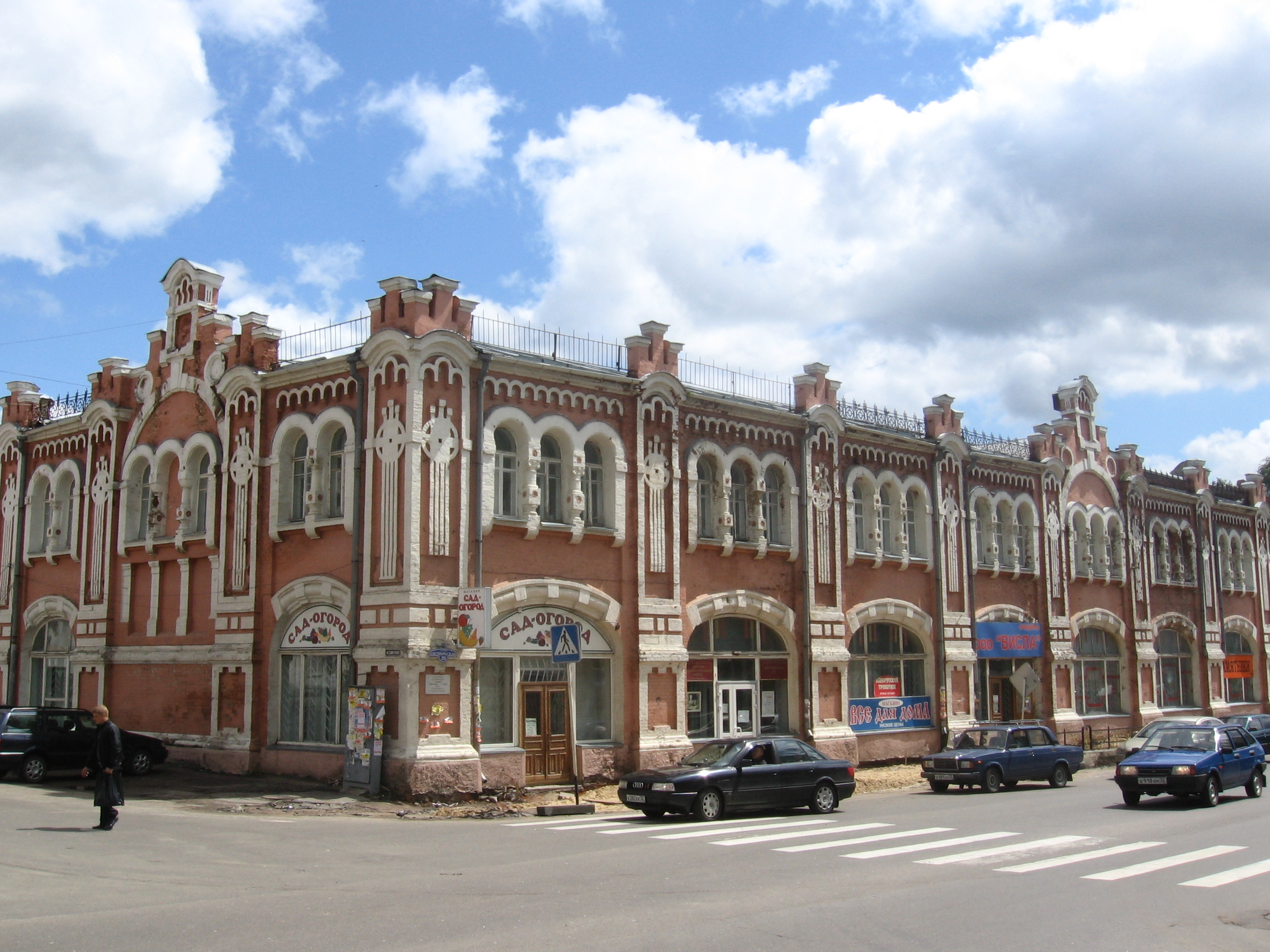 Без названия